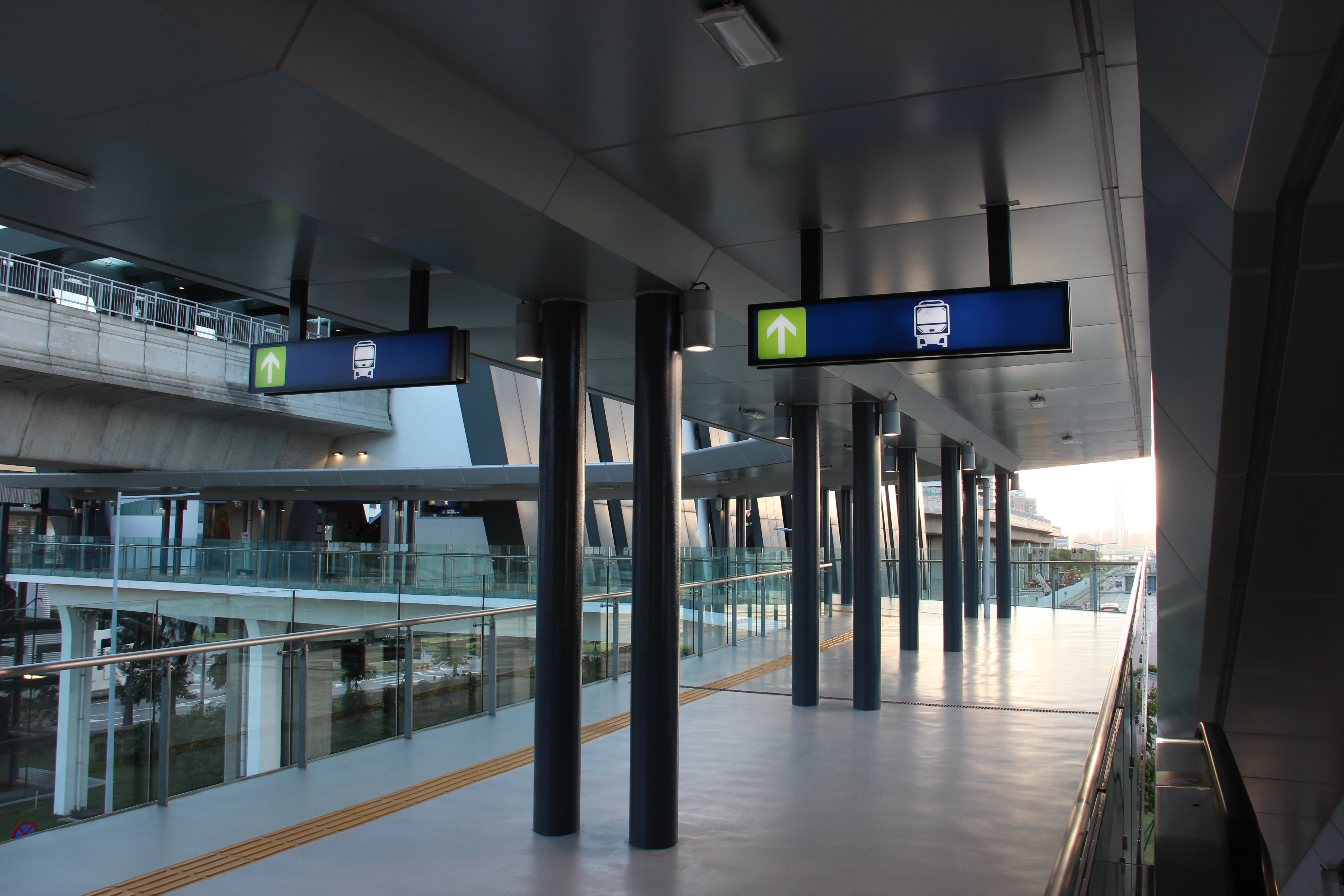 中文（香港）: 澳門輕軌氹仔碼頭站行人天橋